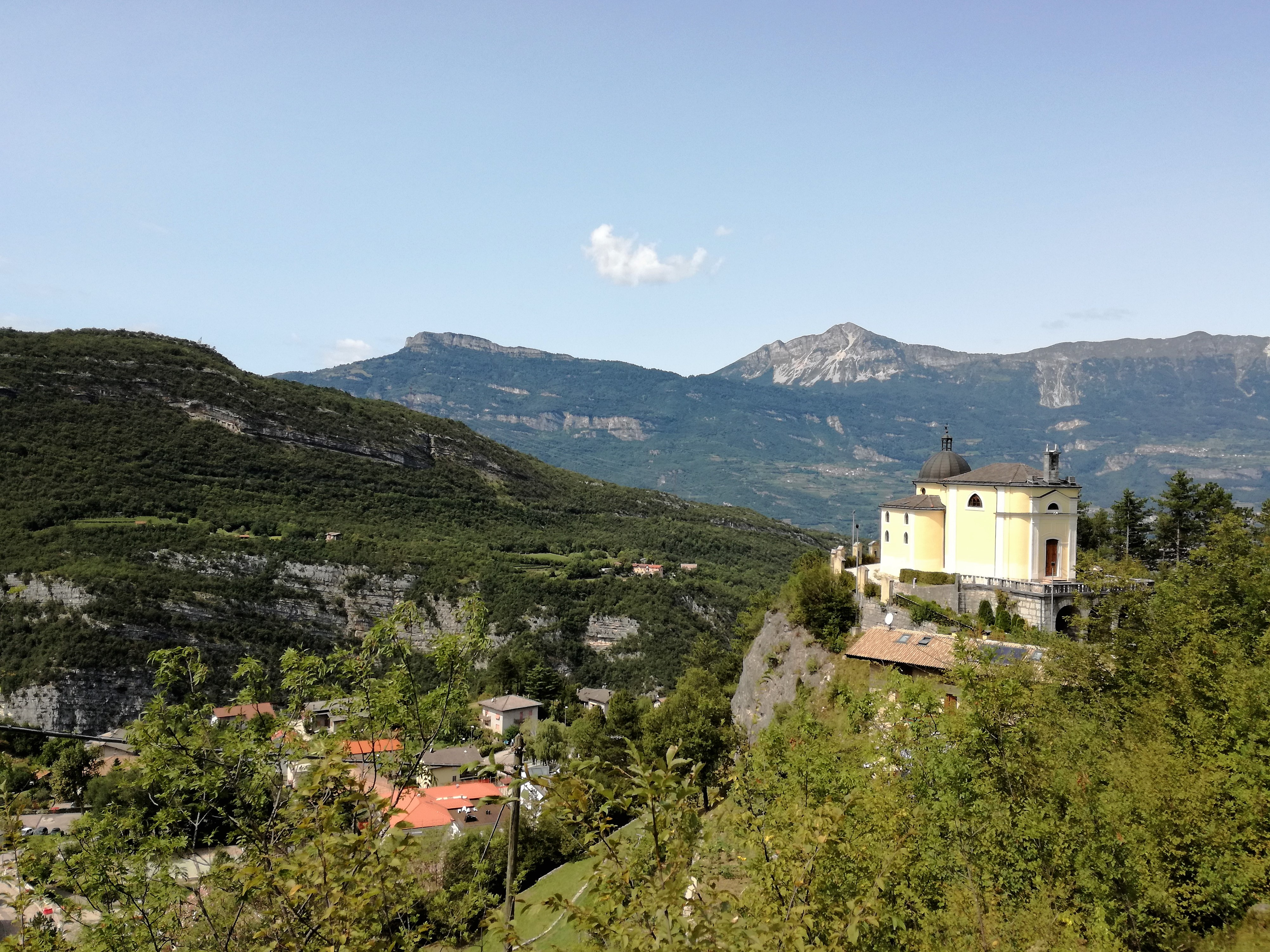 Trambileno Fraktion Moscheri - Wallfahrtskirche Madonna de la Salette